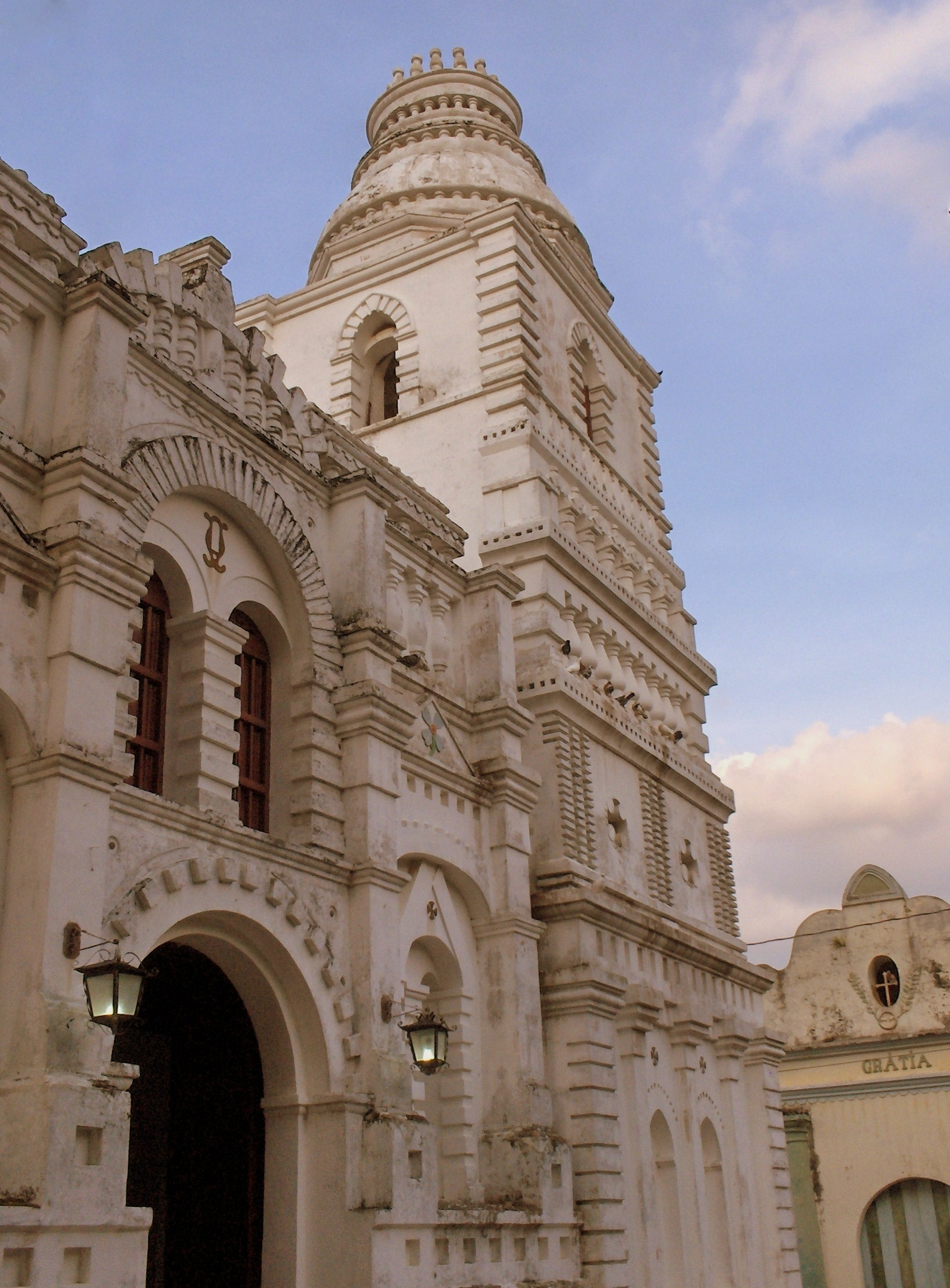 Iglesia San Felipe Apóstol: El principal orgullo de nuestro pueblo, es la Iglesia San Felipe Apóstol. La Parroquia fue Fundada en el año de 1905, por Monseñor Jesús María Alvarado, y era una capilla de bahareque para aquel entonces. Lleva el nombre de San Felipe Apóstol ya que apareció una imagen de madera del mismo en la zona. La construcción de la Iglesia, promovida por el Monseñor Jesús María Alvarado, ocurrió entre los años 1921 y 1928, y se ubica en la calle El Calvario. La misma presenta una mezcla de estilos, donde destacan el Gótico y el Colonial, con bellos ornamentos y detalles en sus paredes, preciosas imágenes entre las que destacan: La Virgen del Rosario, Patrona del Pueblo, la Virgen del Carmen, por supuesto San Felipe Apóstol, San Antonio, El Nazareno, la Dolorosa, el Santo Sepulcro y el Arcángel Gabriel (Tallado por el propio Monseñor Jesús María Alvarado), entre otros; y accesorios de fino tallado como los confesionarios y la pila bautismal. La Iglesia consta de tres naves, incluyendo la principal, la Sacristía, el balcón utilizado en su época para los grupos de Aguinaldo o la Coral, un Jardín, hoy sin utilidad, y una artística torre única en su estilo en Latinoamérica, cuya Cúpula termina en Corona, y no en Cruz, con sus campanas que anuncian las buenas y malas noticias. Adicionalmente, mantiene las catorce imágenes de las estaciones del vía crucis. Como detalle original, aproximadamente en el año 2005, en una de las restauraciones que sufrió la Iglesia, se descubrieron pinturas al fresco pintadas directamente sobre la estructura de las principales columnas, las cuales se encontraban ocultas por capas de pintura; sin embargo, sólo se restauraron algunas.